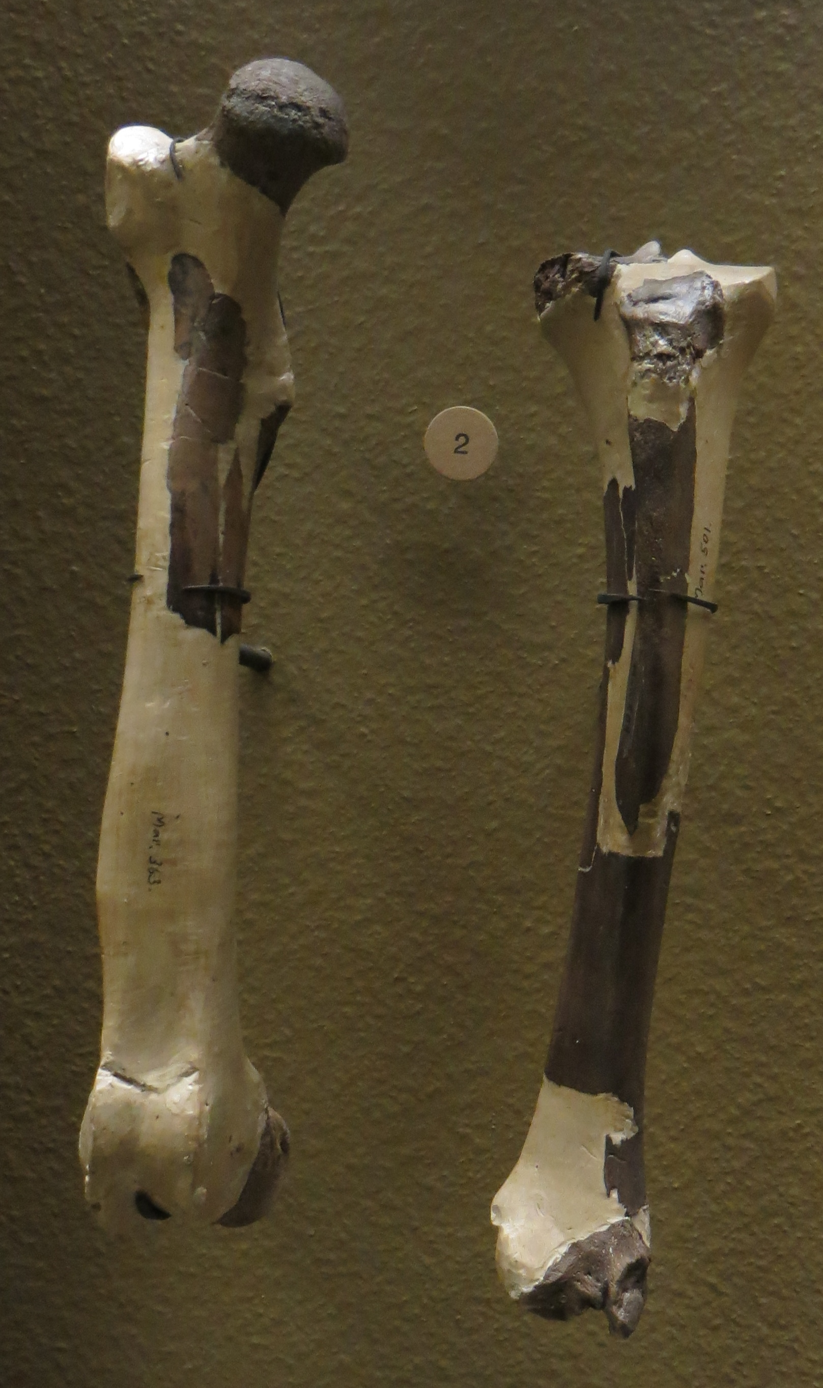 Fossil of Elomeryx- Took the picture at Natural History Museum, Basel